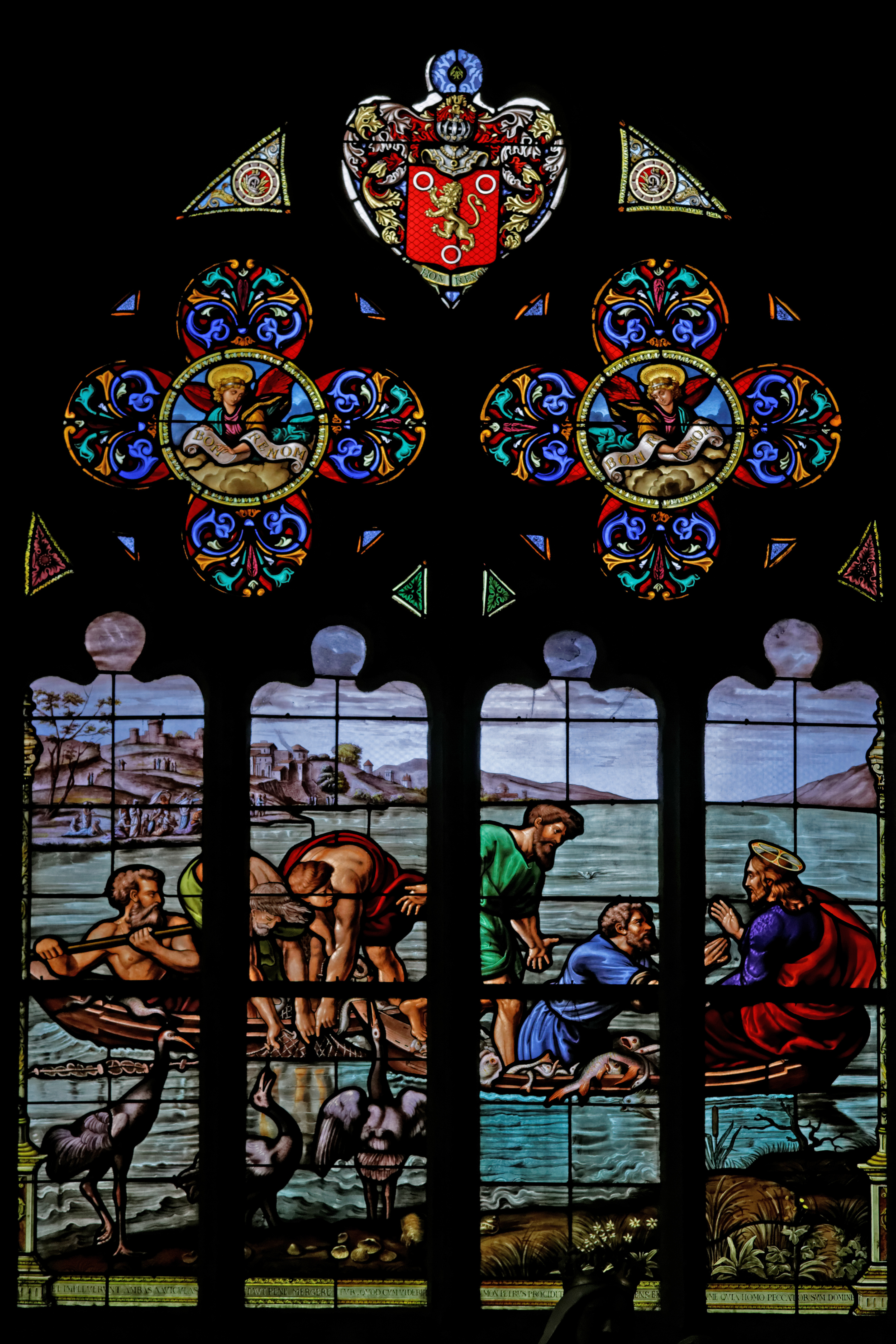 Vitrail représentant une Pêche miraculeuse, d'après un carton de tapisserie de Raphaël dans la cathédrale Saint-Paul-Aurélien de Saint-Pol-de-Léon.